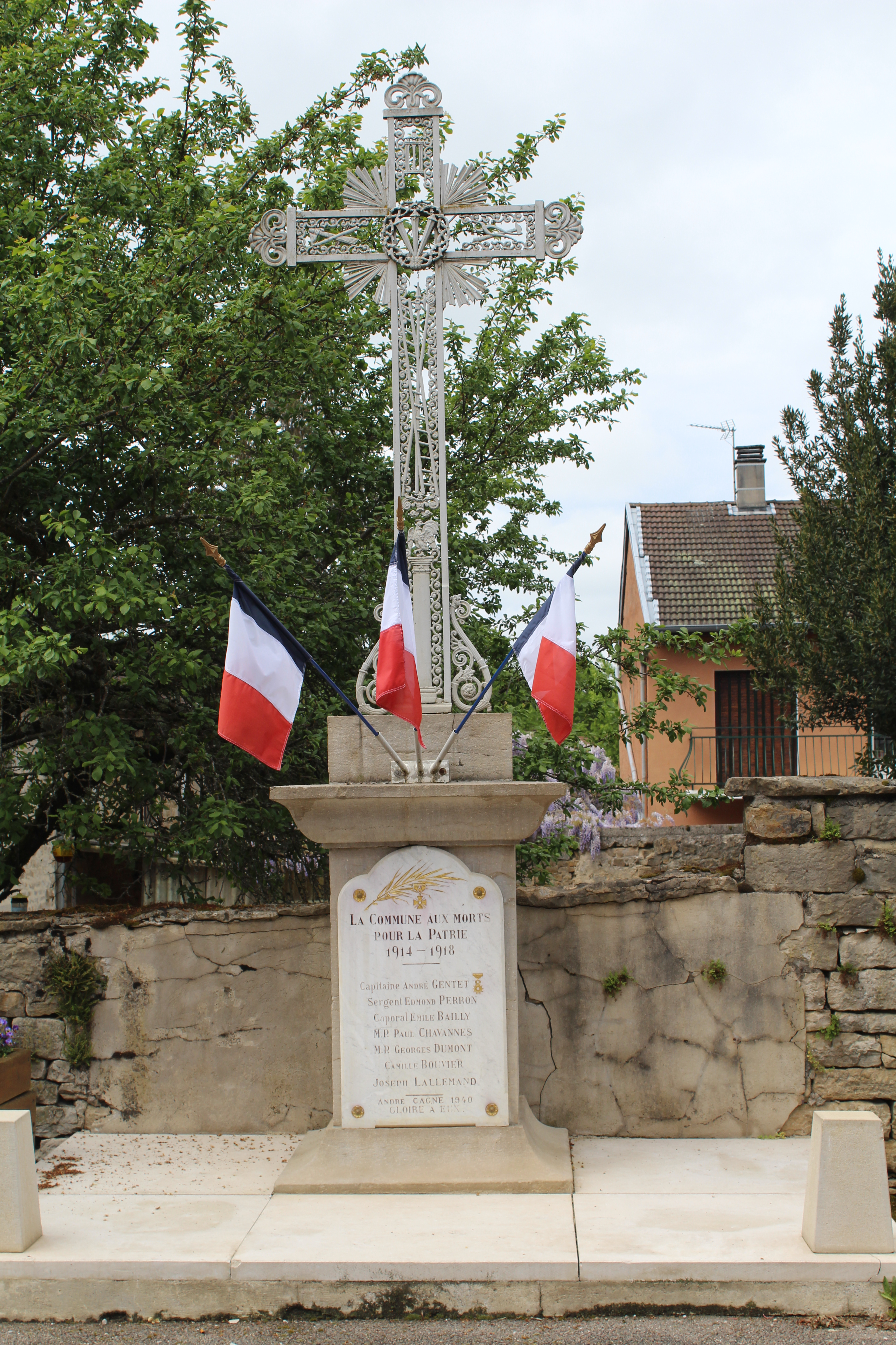 Monument aux morts de Chille.